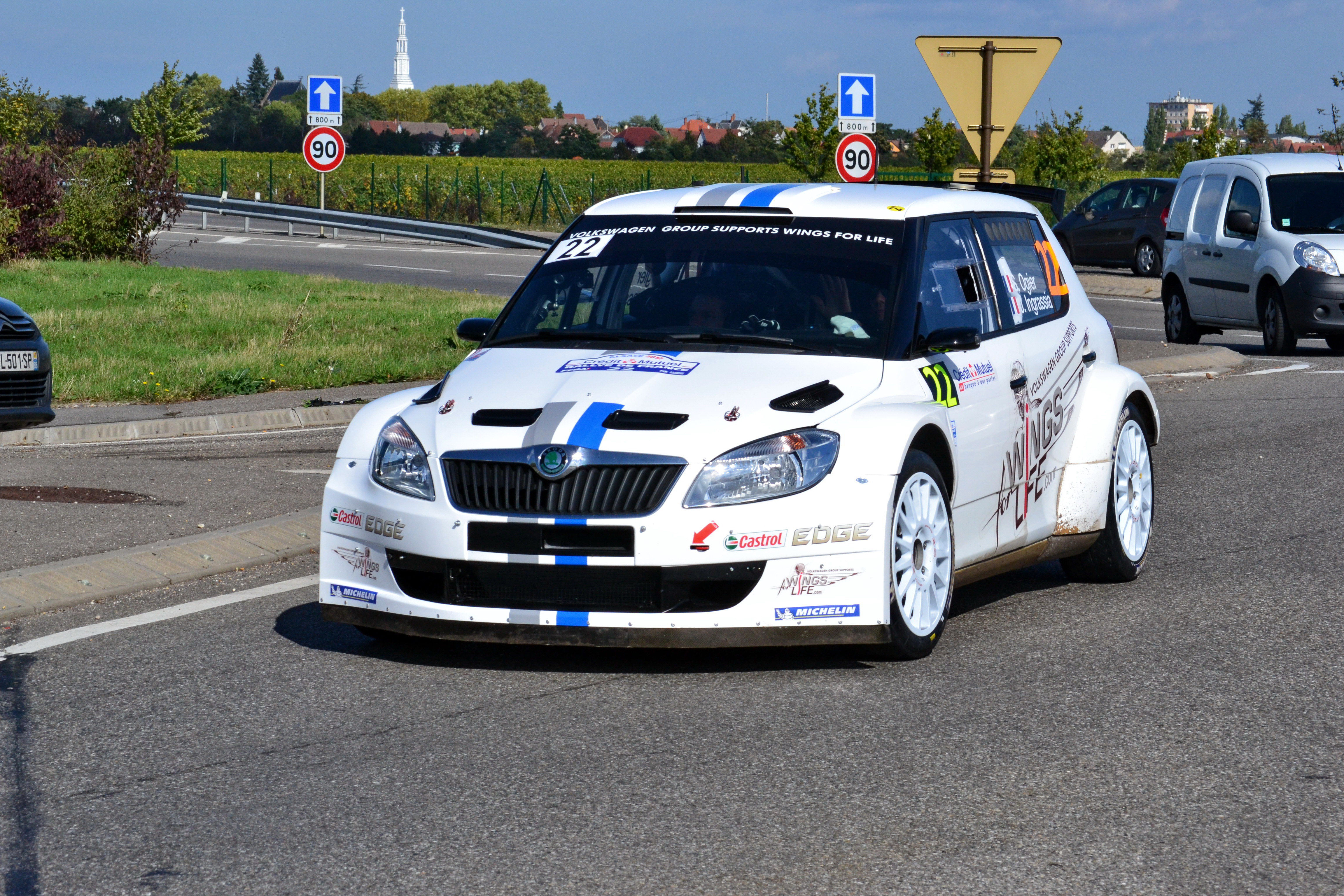 Sébastien Ogier sur la route de liaison entre le parc d'assistance de Colmar et l'ES5 Hohlandsbourg-Firstplan 2 durant le Rallye de France-Alsace 2012.